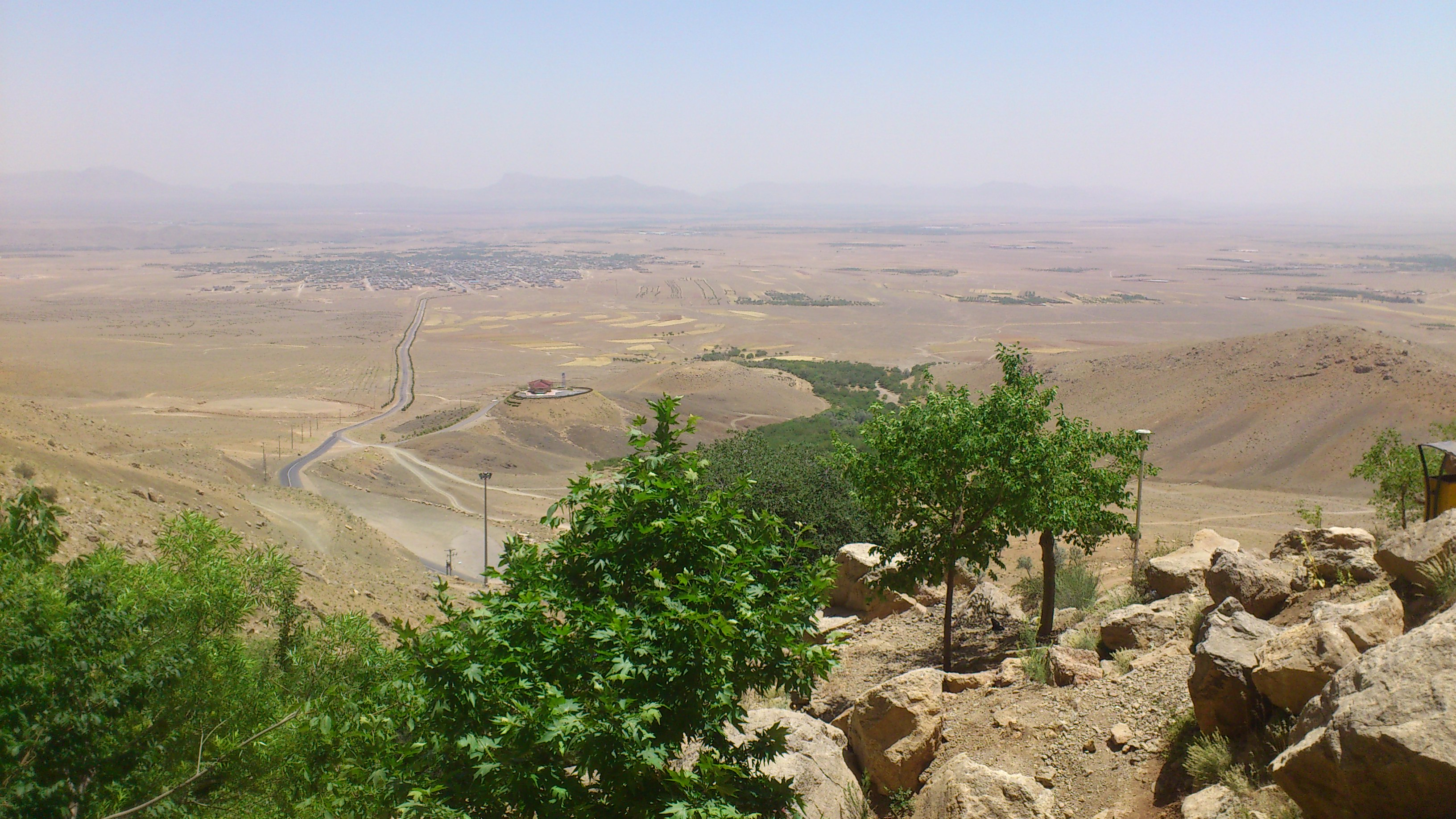 شهر